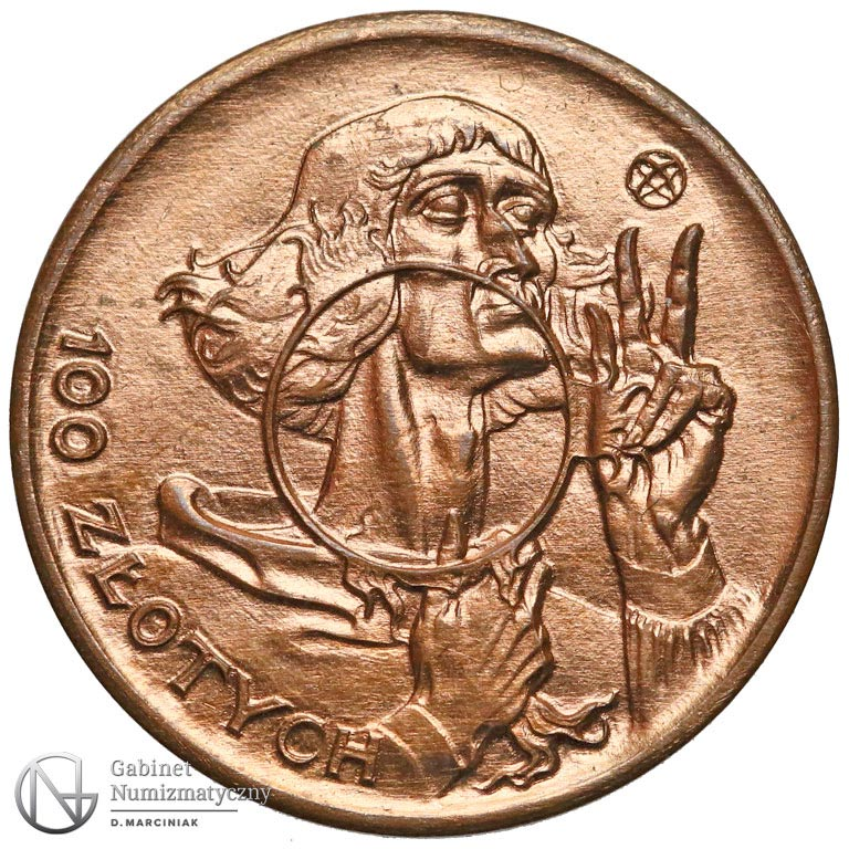 Próba bez napisu 100 złotych 1925 mały Kopernik rewers brąz